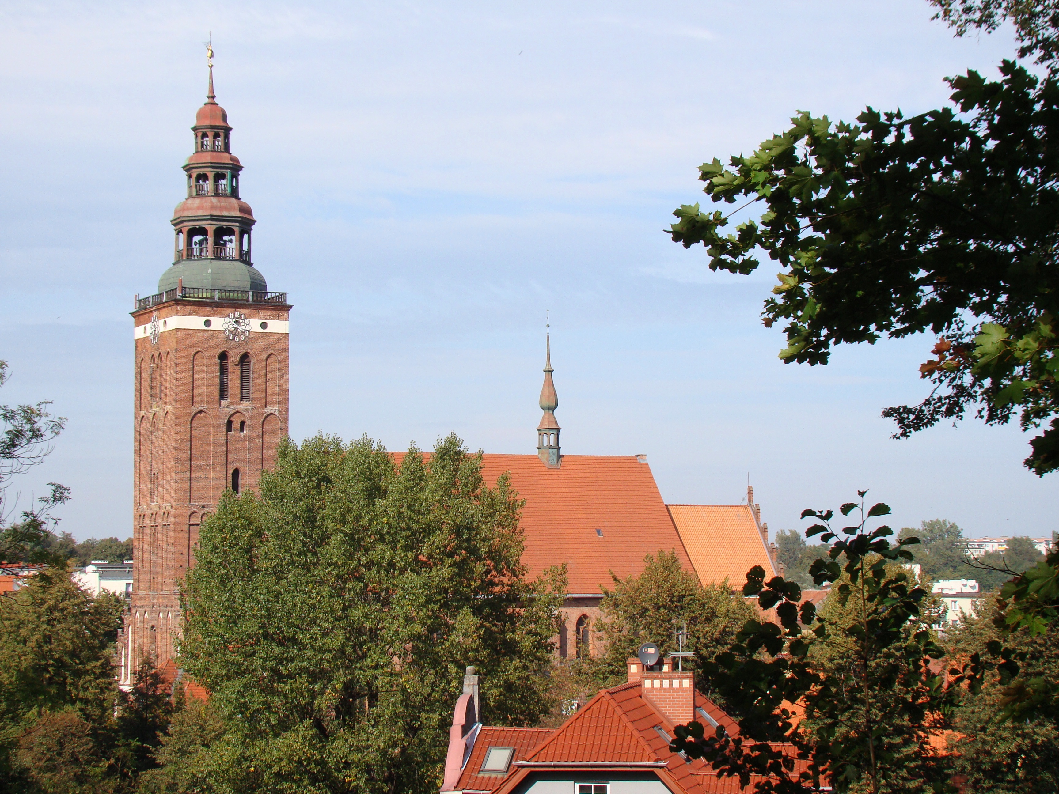 Kolegiata pw. św. Piotra i Pawła w Lidzbarku Warmińskim